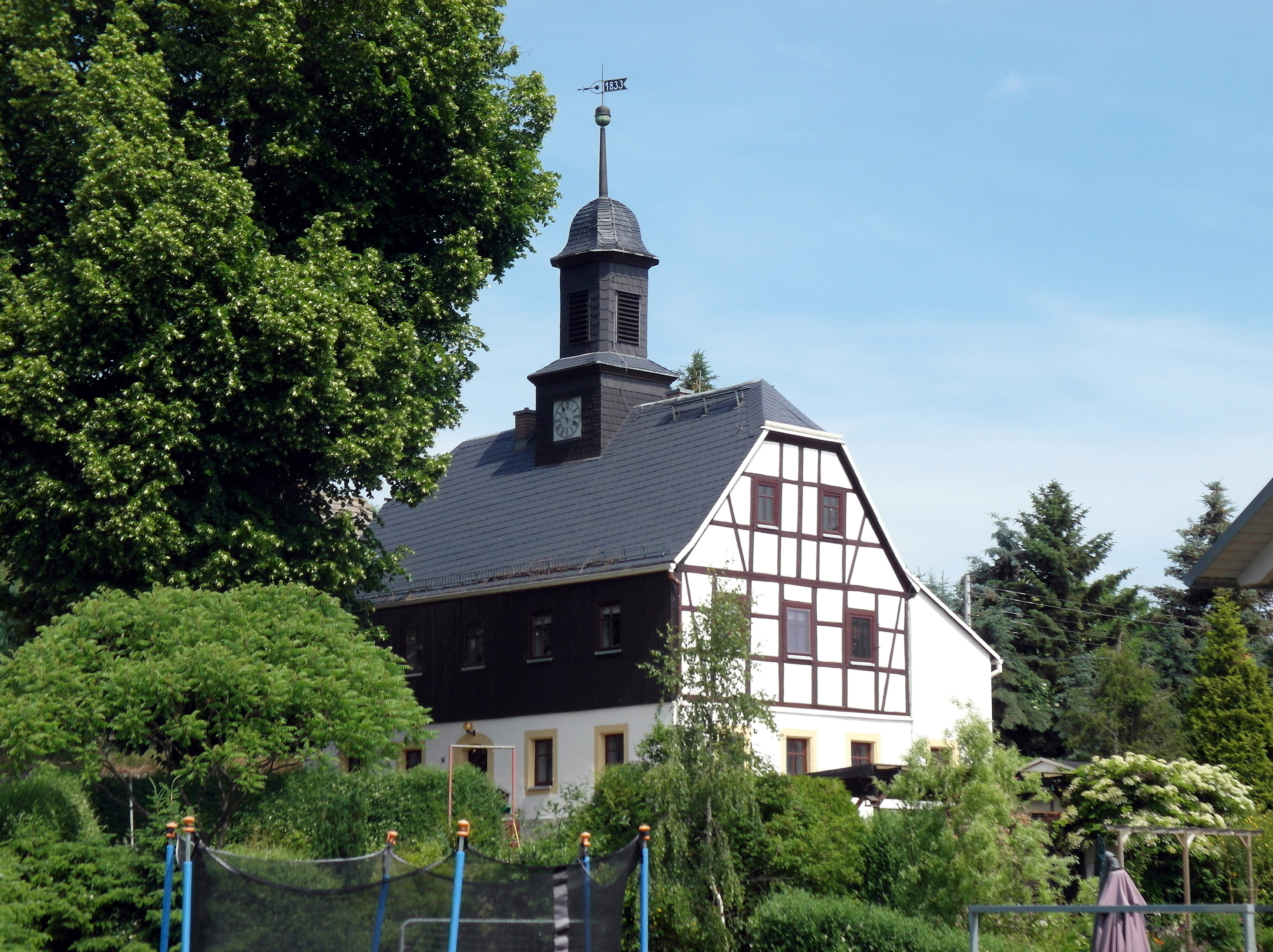 14.06.2015 01734 Lübau (Rabenau): Ehemalige alte Dorfschule, Dorfstraße 16 (GMP: 50.953644,13.618510). Im Jahre 1833 wurde die Schule erbaut und seit 1953 bis zur Eingemeindung als Gemeindeamt genutzt. [SAM0956.JPG]20150614085DR.JPG(c)Blobelt